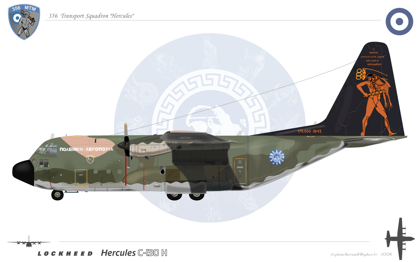 C 130H Greece air Force